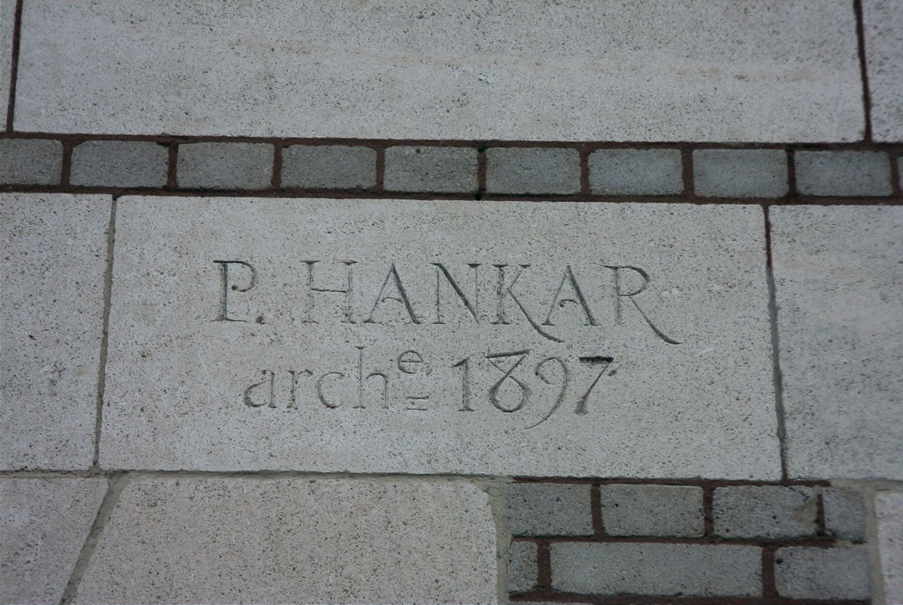 Tábla a házfalon, a tervező nevét megörökítendő, Brüsszel